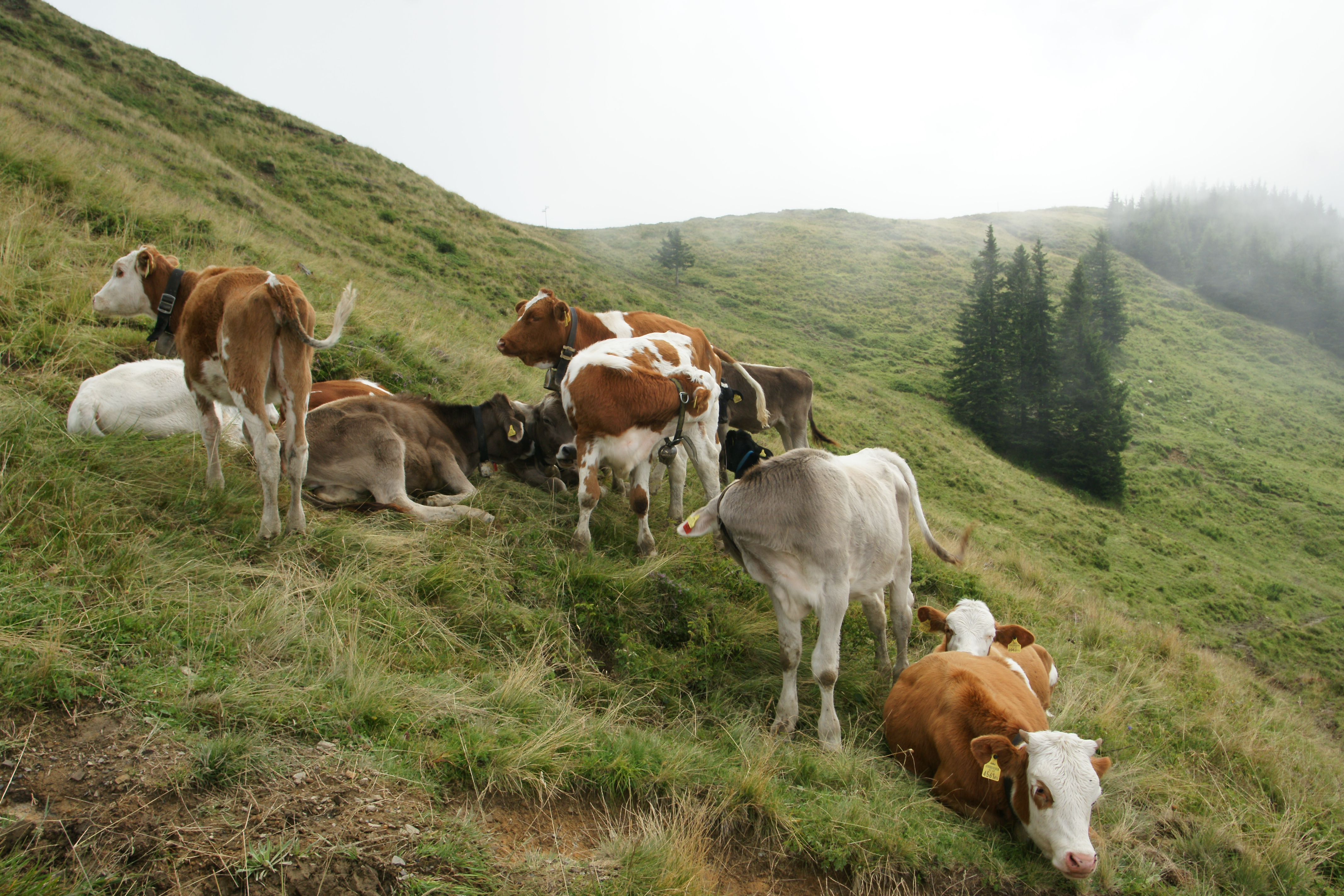 Braunvieh- und Red-Holstein-Rinder (Fleckvieh?) auf der Hohen Kugel in Götzis.